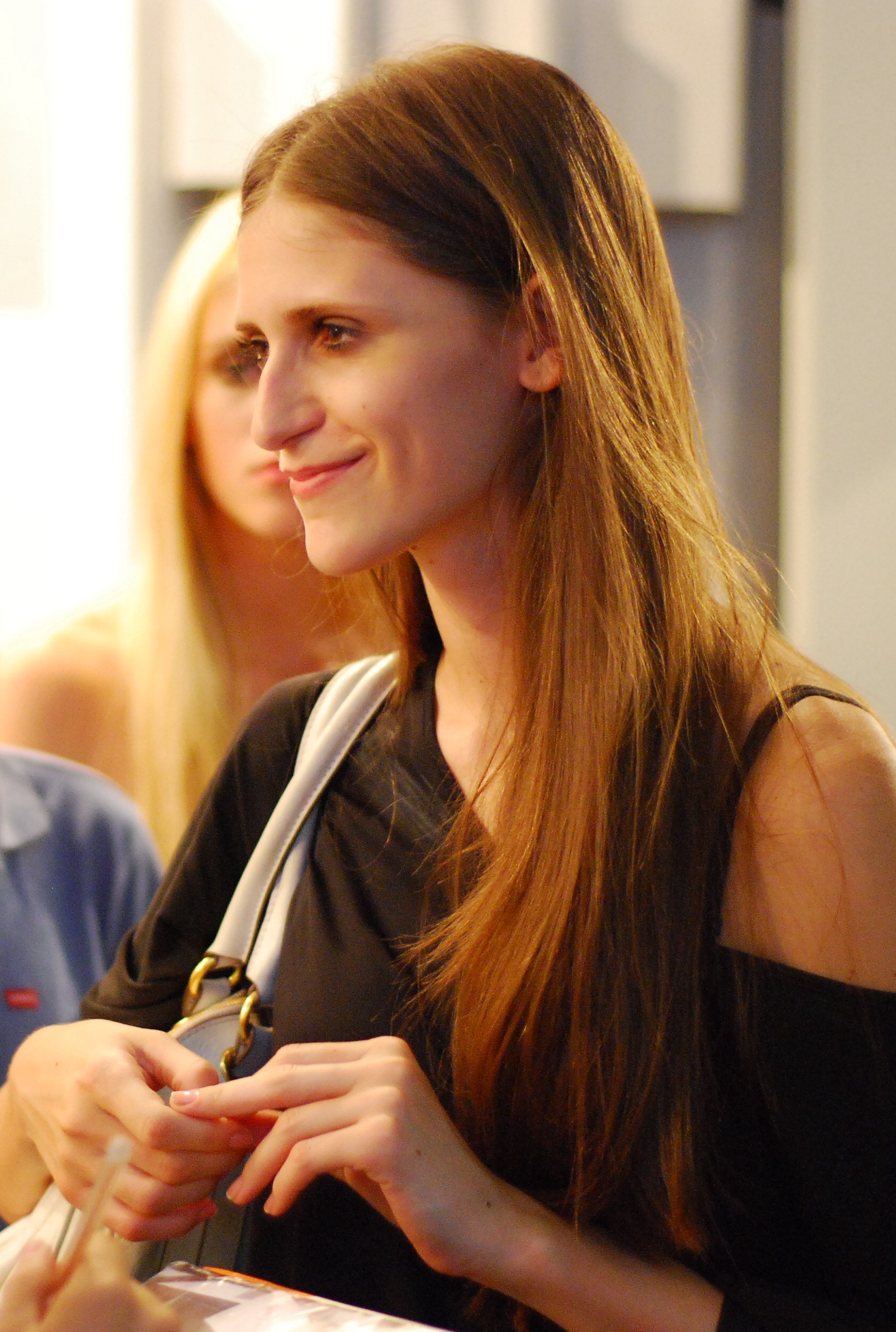 Daiane Conterato